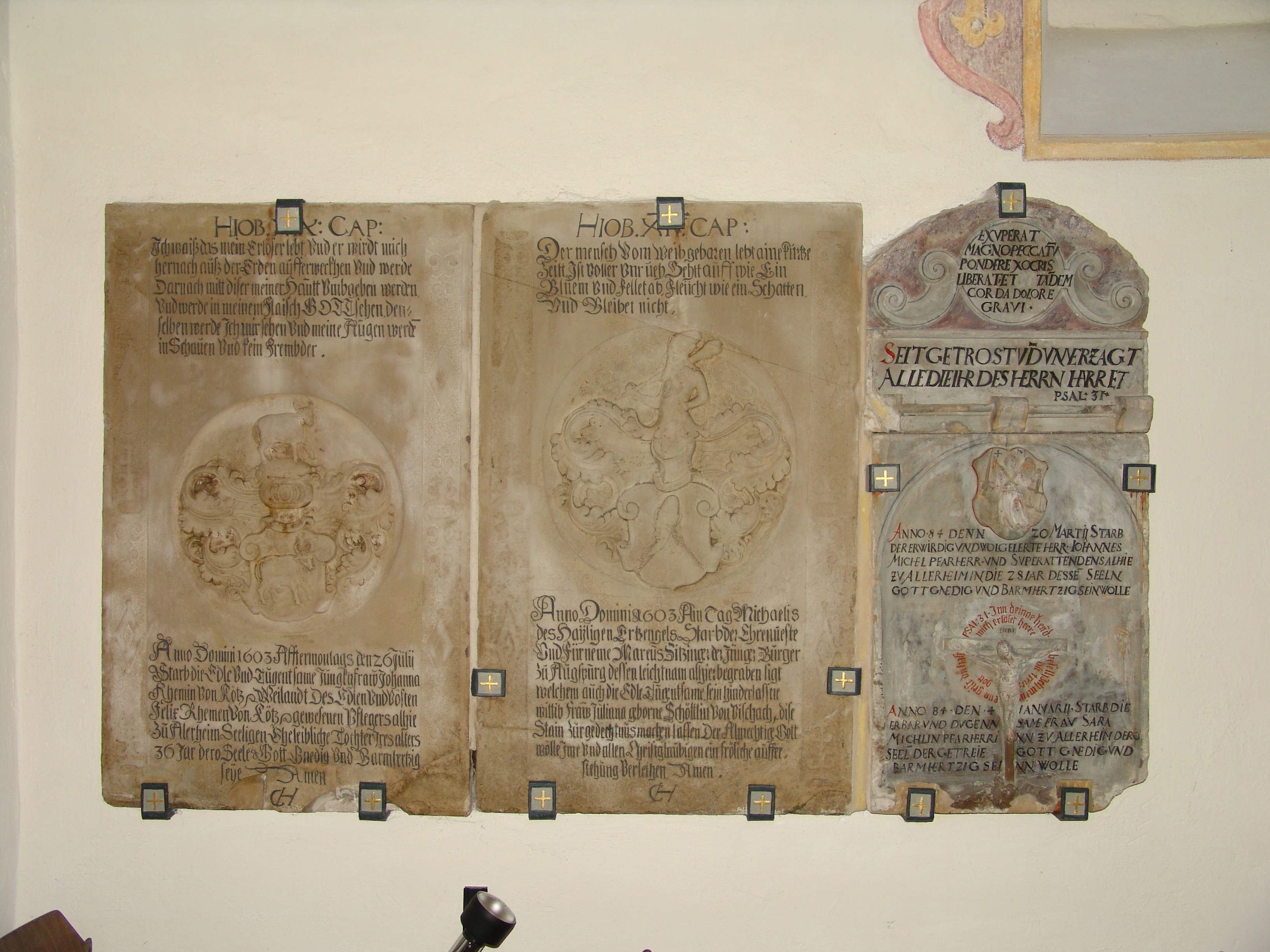 evang.-luth. Kirche St. Stephanus in Alerheim, Epithaphen